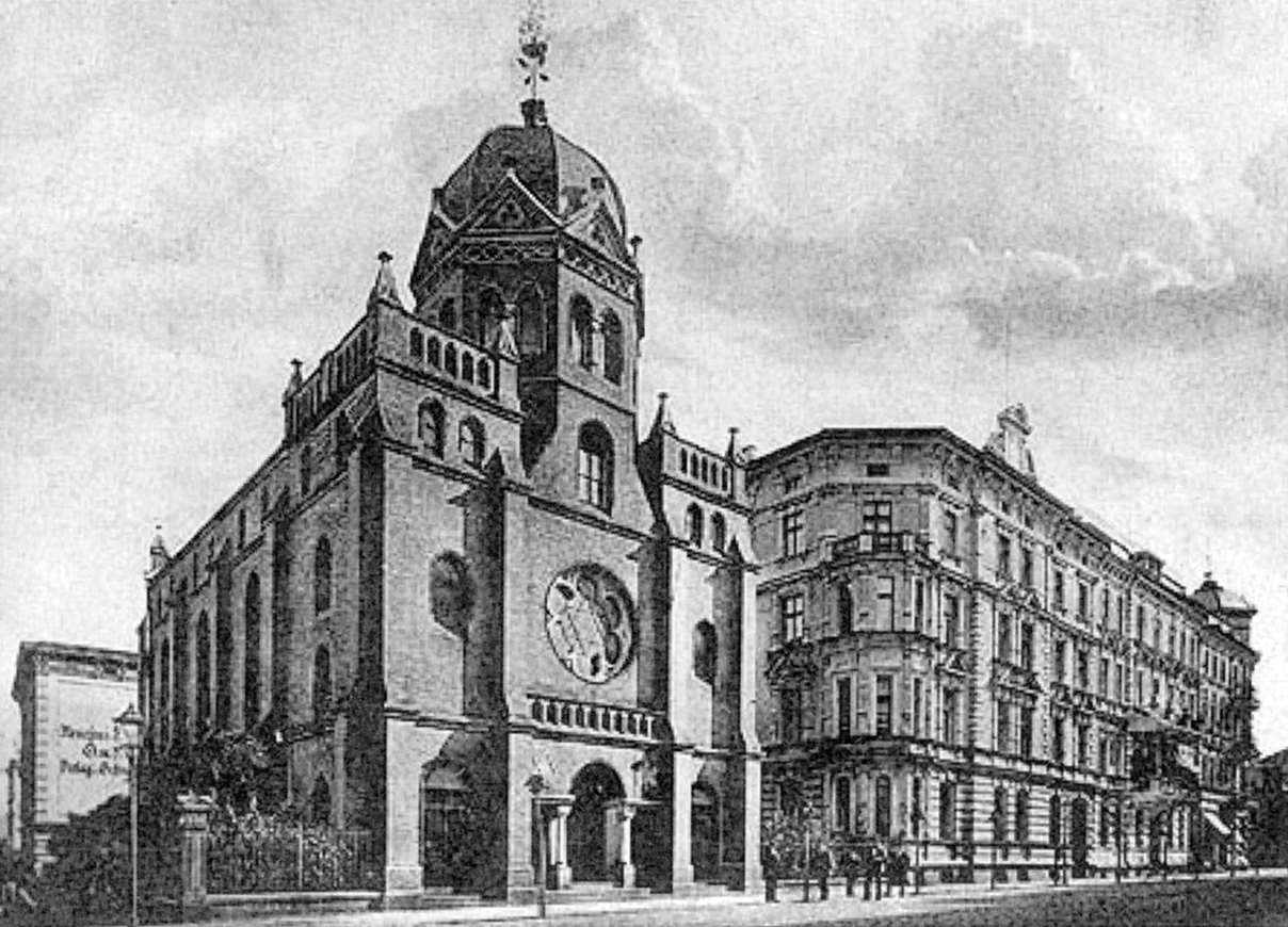 Synagoga w Kłodzku na starej karcie pocztowej